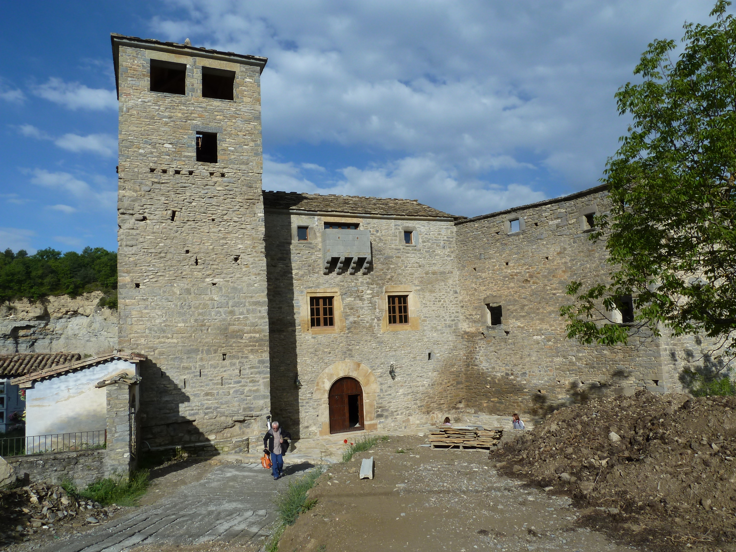 Fachada principal y torre de planta cuadrada de casa de los Mur en Formigales (Huesca)